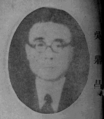 中文（台灣）: 民國名人圖鑑肖像